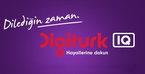 orjinal